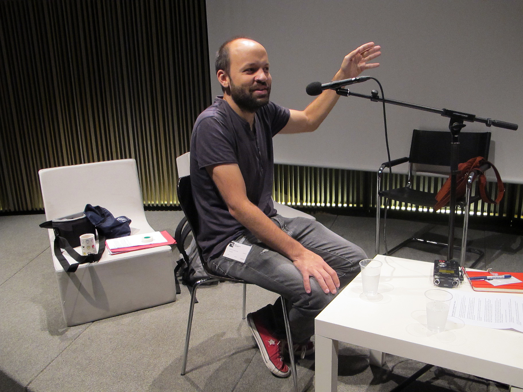 Miguel Noguera